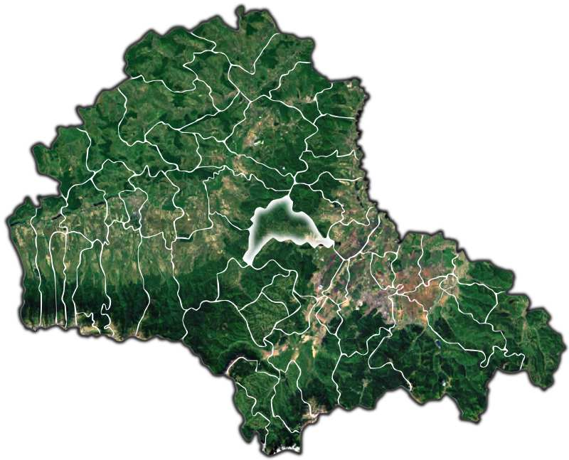 Dumbravita jud Brasov